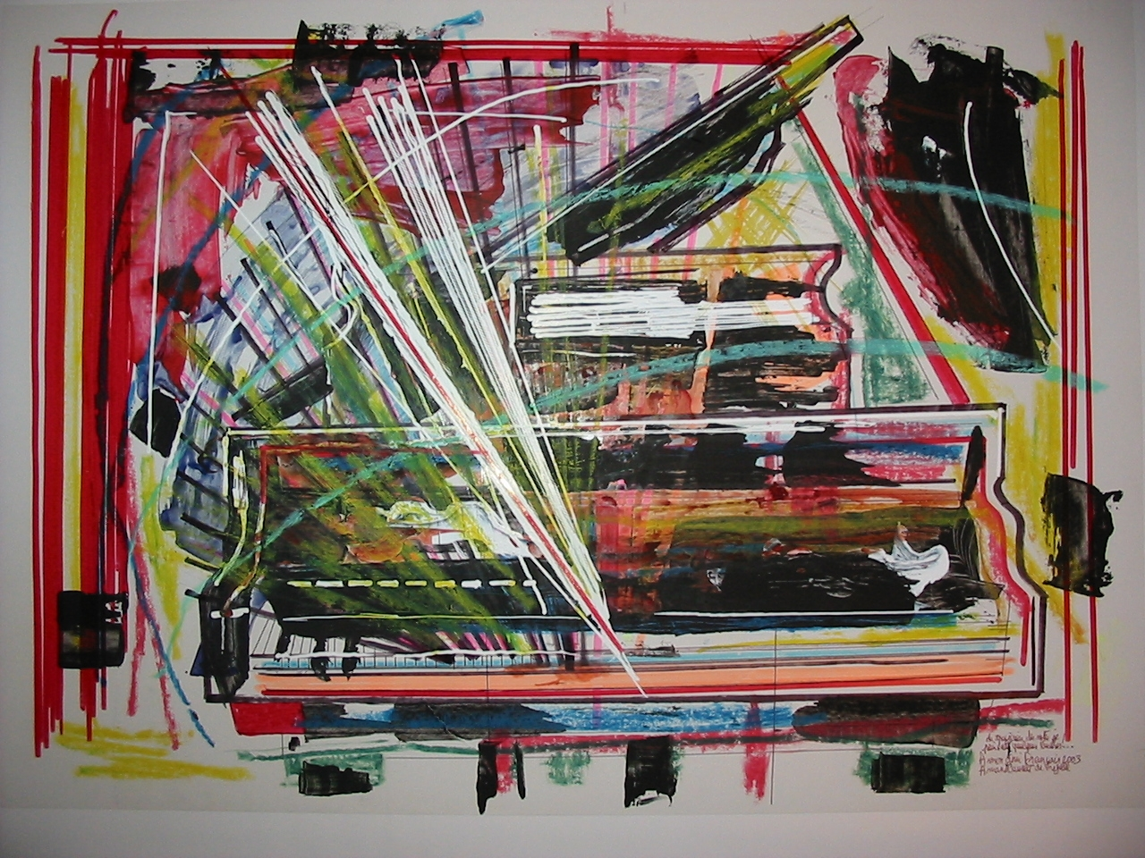 Du Magicien des notes je peindrai quelques touches, Arnaud Courlet de Vregille (2003, Acrylique et pastel, 60 x 40 cm)